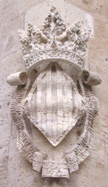 Escut de la ciutat a un cantó de la Llotja de la Seda, entre els carrers de Pere Comte i de la Llotja, València. Valencia Coat of Arms in a corner between Pere Comte and La Llotja streets, in the Silk Exchange (Llotja de la Seda) Valencia, Spain.